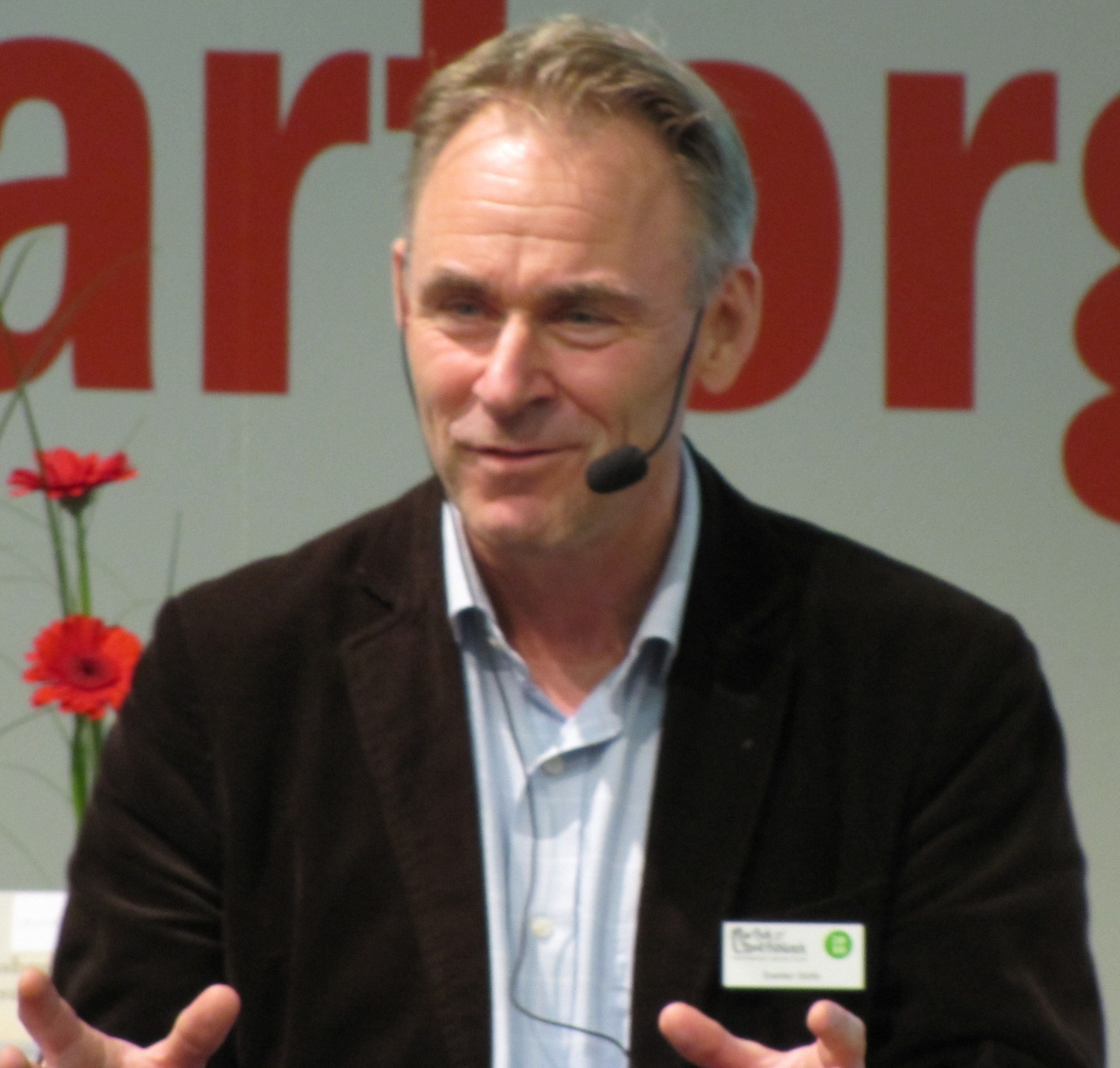 Sverker Sörlin, professor vid KTH, bild från forskartorget på Bokmässan 2010.